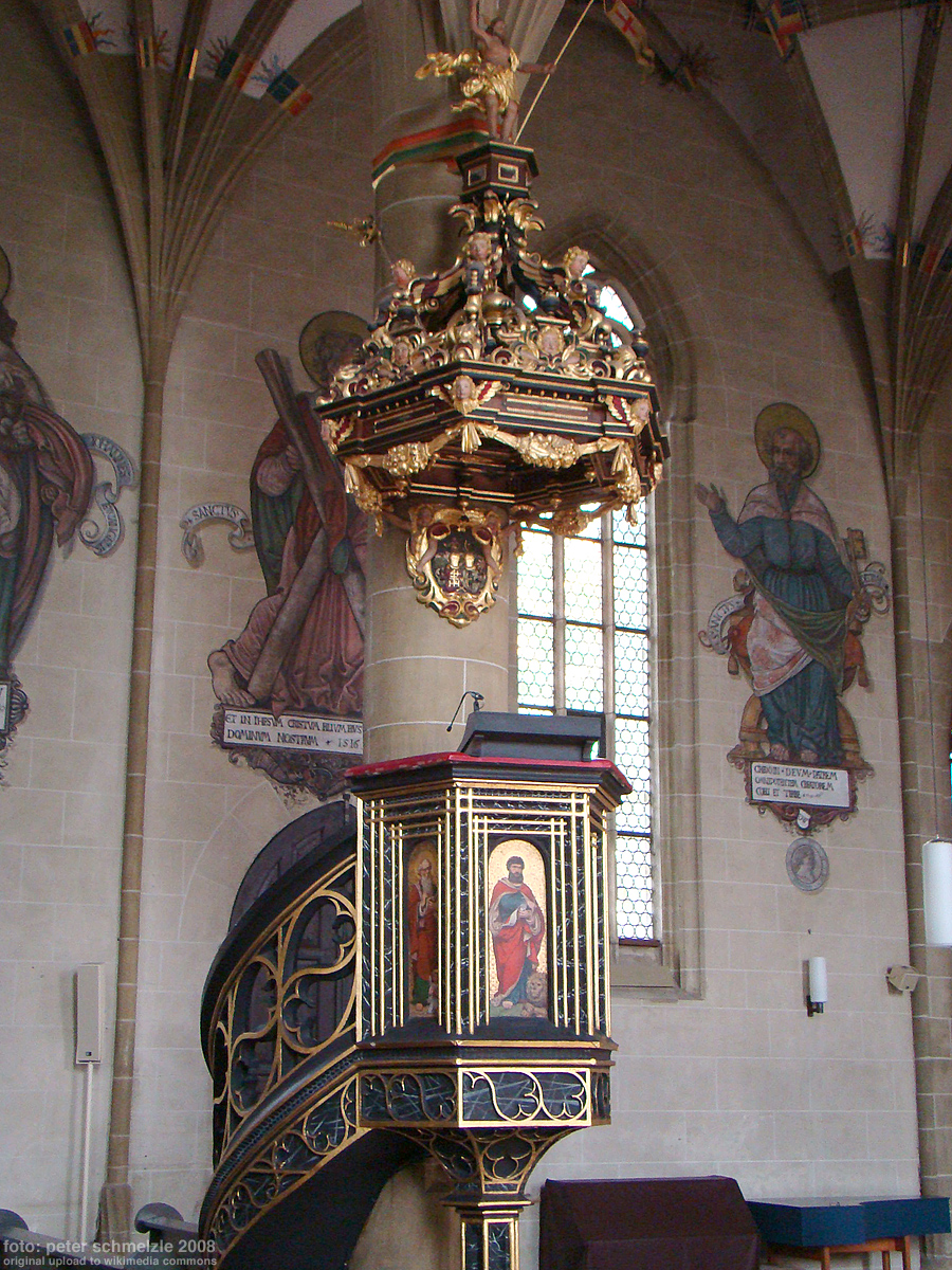 Kanzel der Stadtkirche Bad Wimpfen